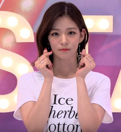 11일 오전 서울 상암동 tbs 오픈스튜디오에서 공개녹화로 ‘tbs 팩트인스타 - ‘프로미스나인’편이 진행됐다.